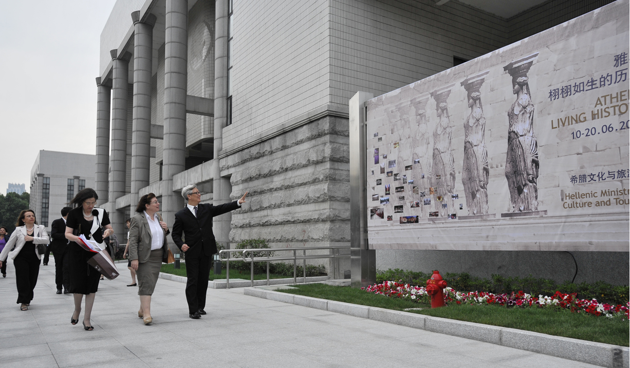 Εγκαίνια Έκθεσης ΥΠΠΤΟ με θέμα «Αθήνα: Μια Ζωντανή Ιστορία» σε Βιβλιοθήκη Σαγκάης, στα πλαίσια συμμετοχής χώρας μας σε WEXPO. Την εκδήλωση προσφώνησε η Γενική Πρόξενος, Μ. Σαράντη, τονίζοντας ότι η έκθεση ενισχύει τη συμμετοχή Ελλάδος στην WEXPO, συνάδει με θέμα της «Better City Better City» και προωθεί συνεργασία Ελλάδος-Κίνας στον τομέα πολιτισμού και Τουρισμού» Φωτογραφία: Υπουργείο Εξωτερικών